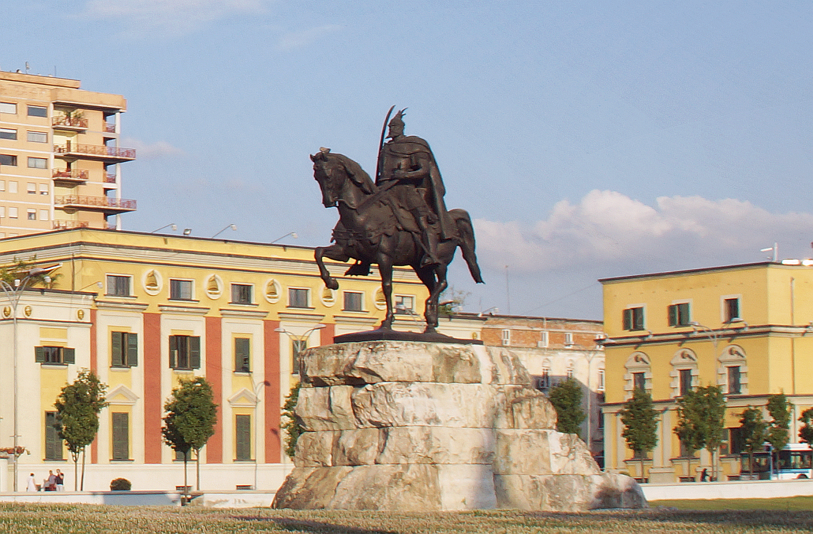 Das 1968 erschaffene Reiterstandbild "Fürst Skanderbeg" am Skanderbeg-Platz in Tirana Albanien - Foto 2014 Wolfgang Pehlemann DSC05897